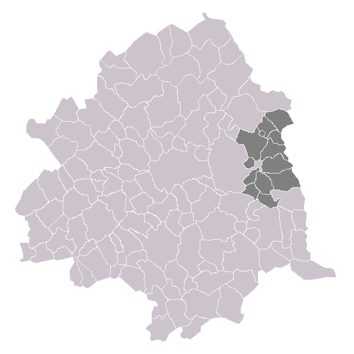 Canton de Lannoy dans l'arrondissement de Lille